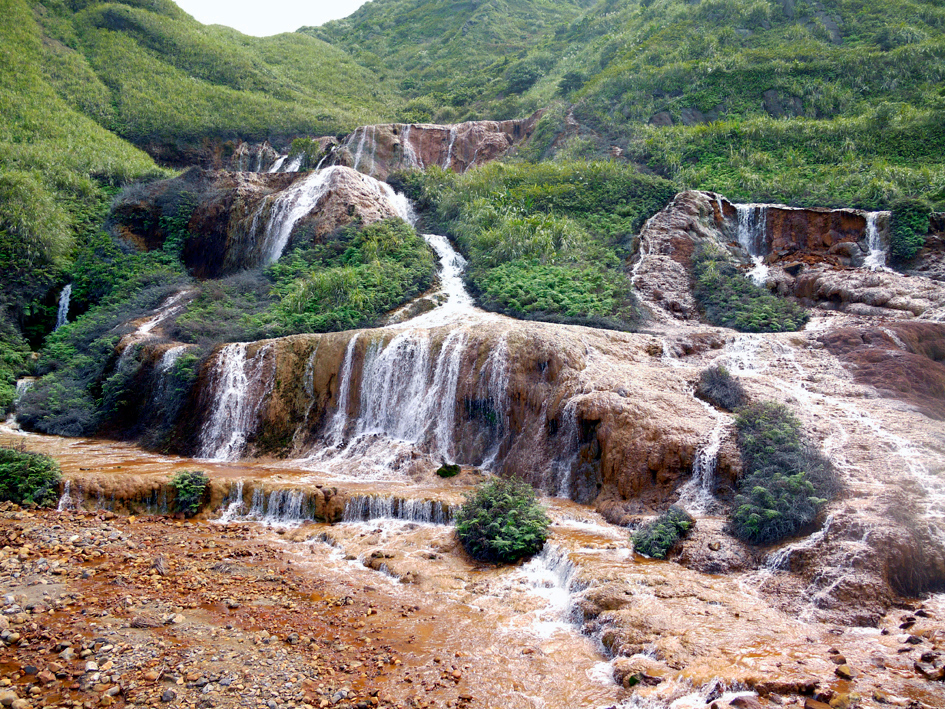 金瓜石黃金瀑布